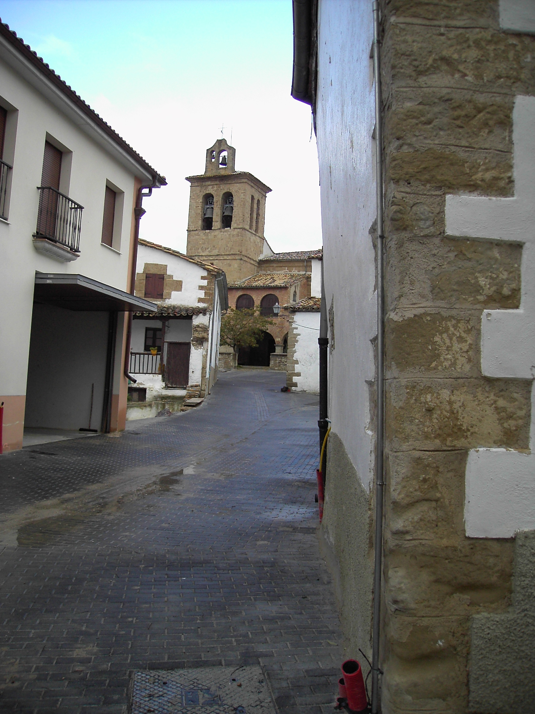 Utergako, Nafarroako erdialdeko udaleko karrika. Kalearen beste aldean, Jasokunde eliza.